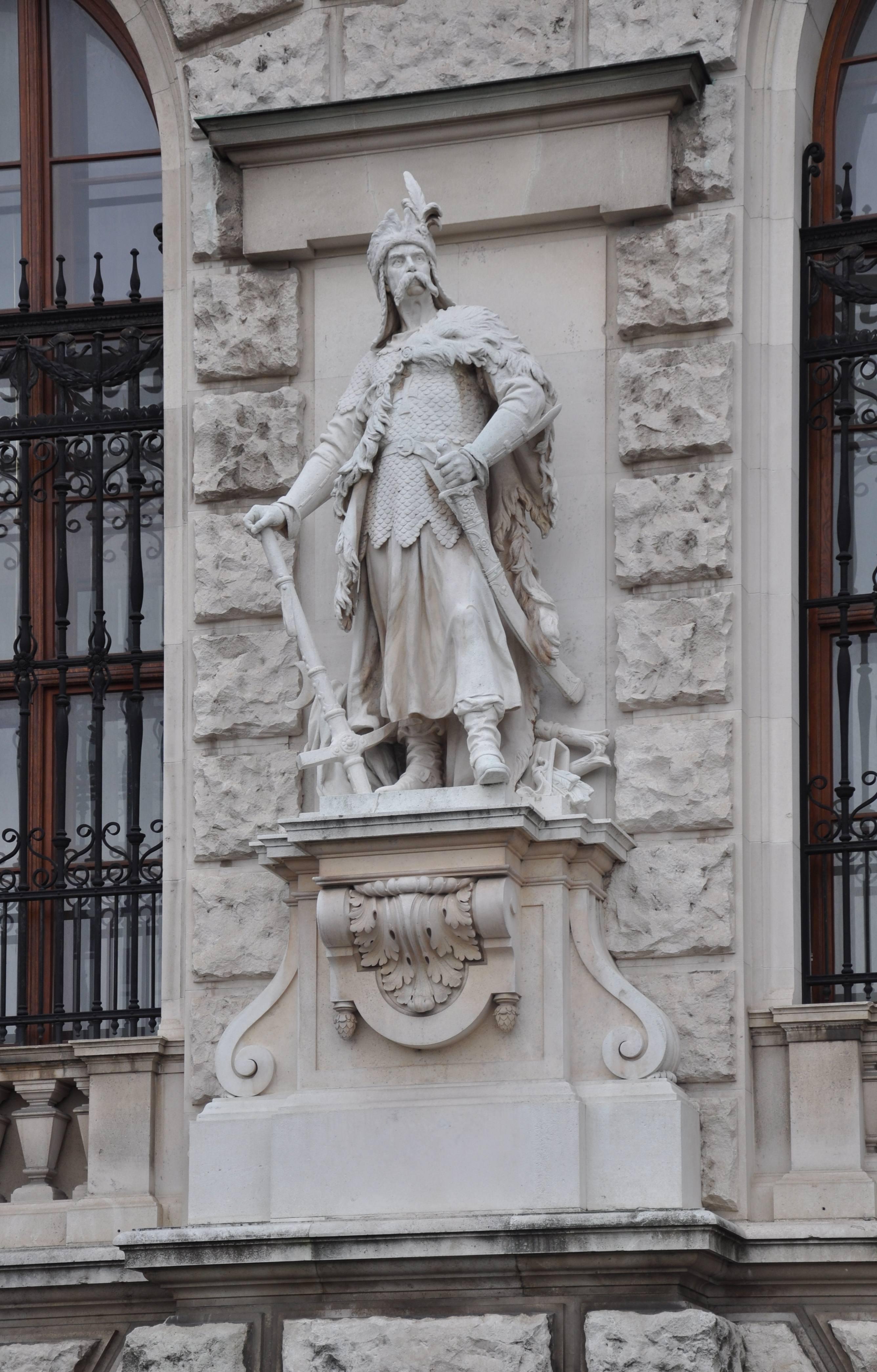 Wien, Neue Burg, Statuen an der Hauptfassade am Heldenplatz, zwanzig Gestalten der österreichischen Geschichte (verschiedene Bildhauer) Nr. 17: Anton Brenek: Pole von 1683